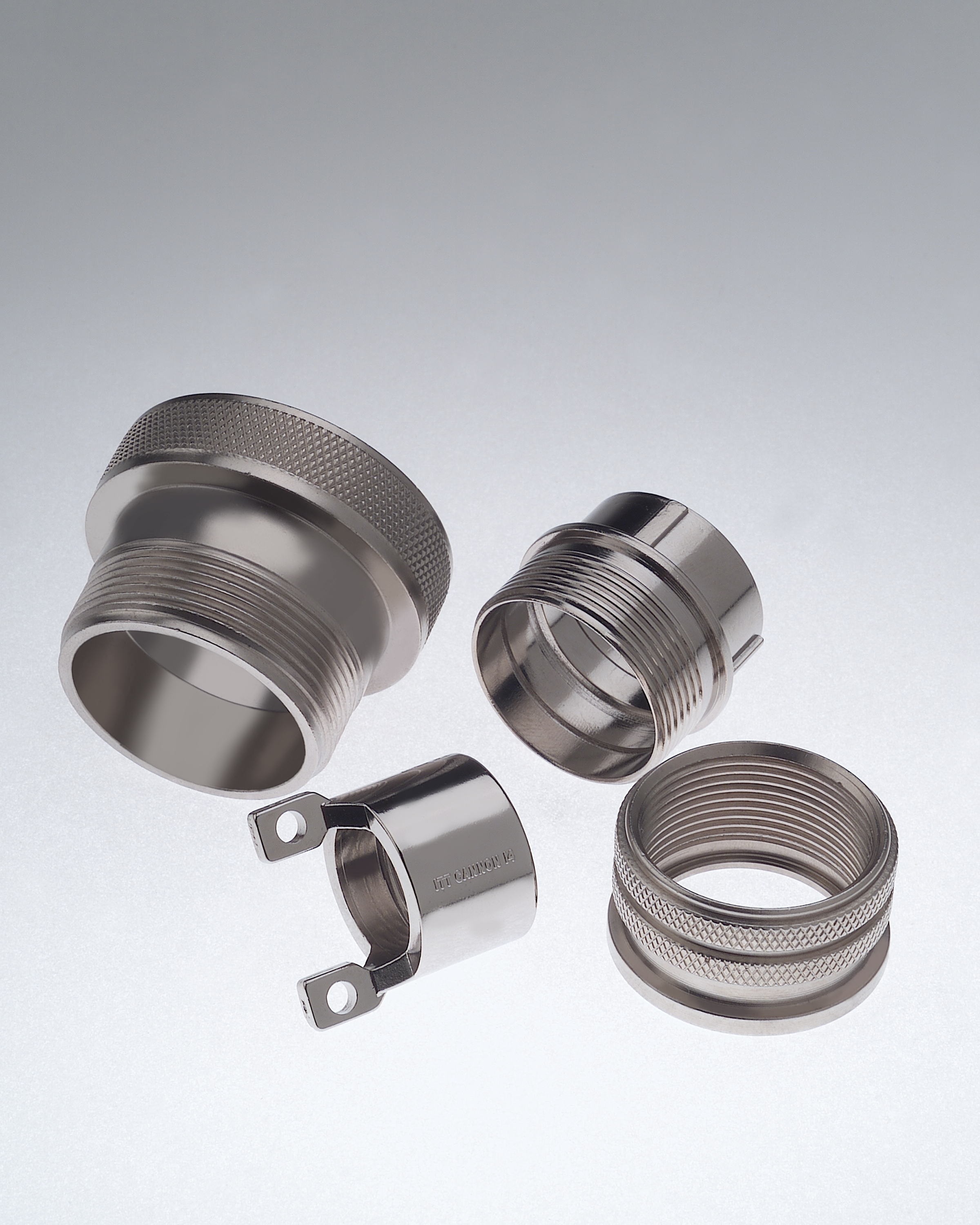 photos electroless nickel